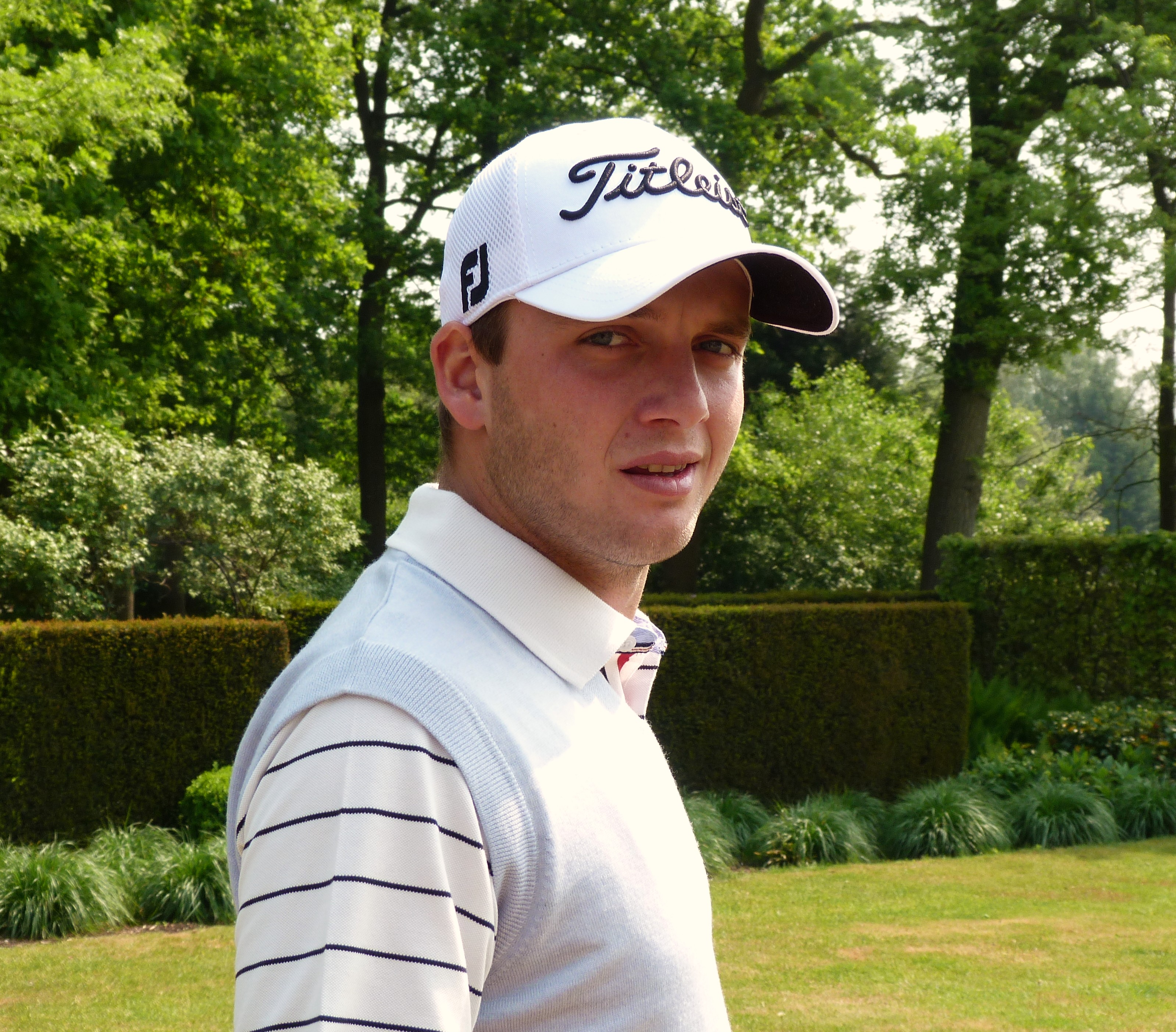 Michiel Hermans